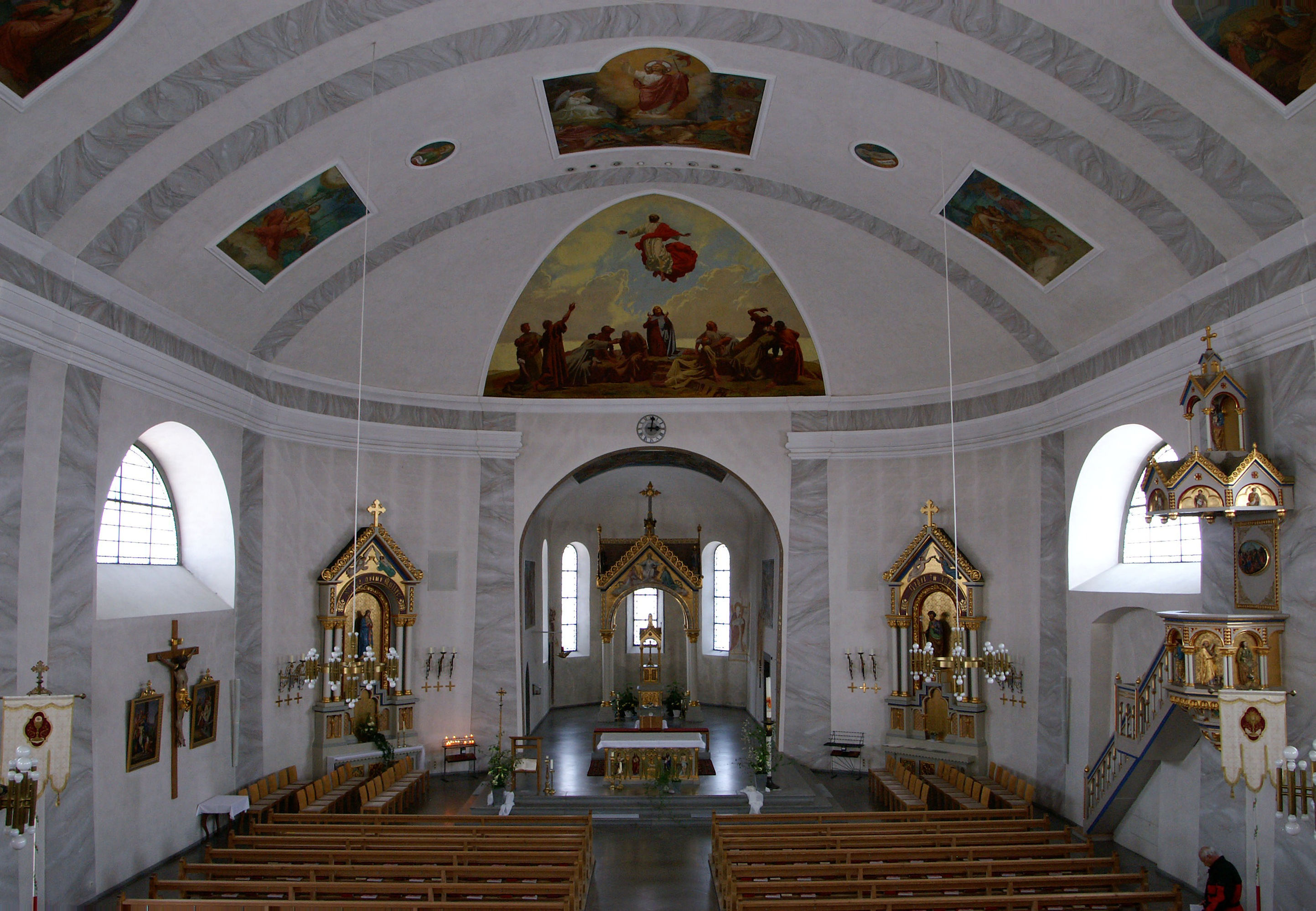 Blick in die Pfarrkirche hl. Laurentius in Sulzberg, Vorarlberg. aus dem DEHIO Vorarlberg 1983: Umbau und Neubau des Langhauses 1828/29 nach Plänen von Alois Negrelli , Weihe 1833.